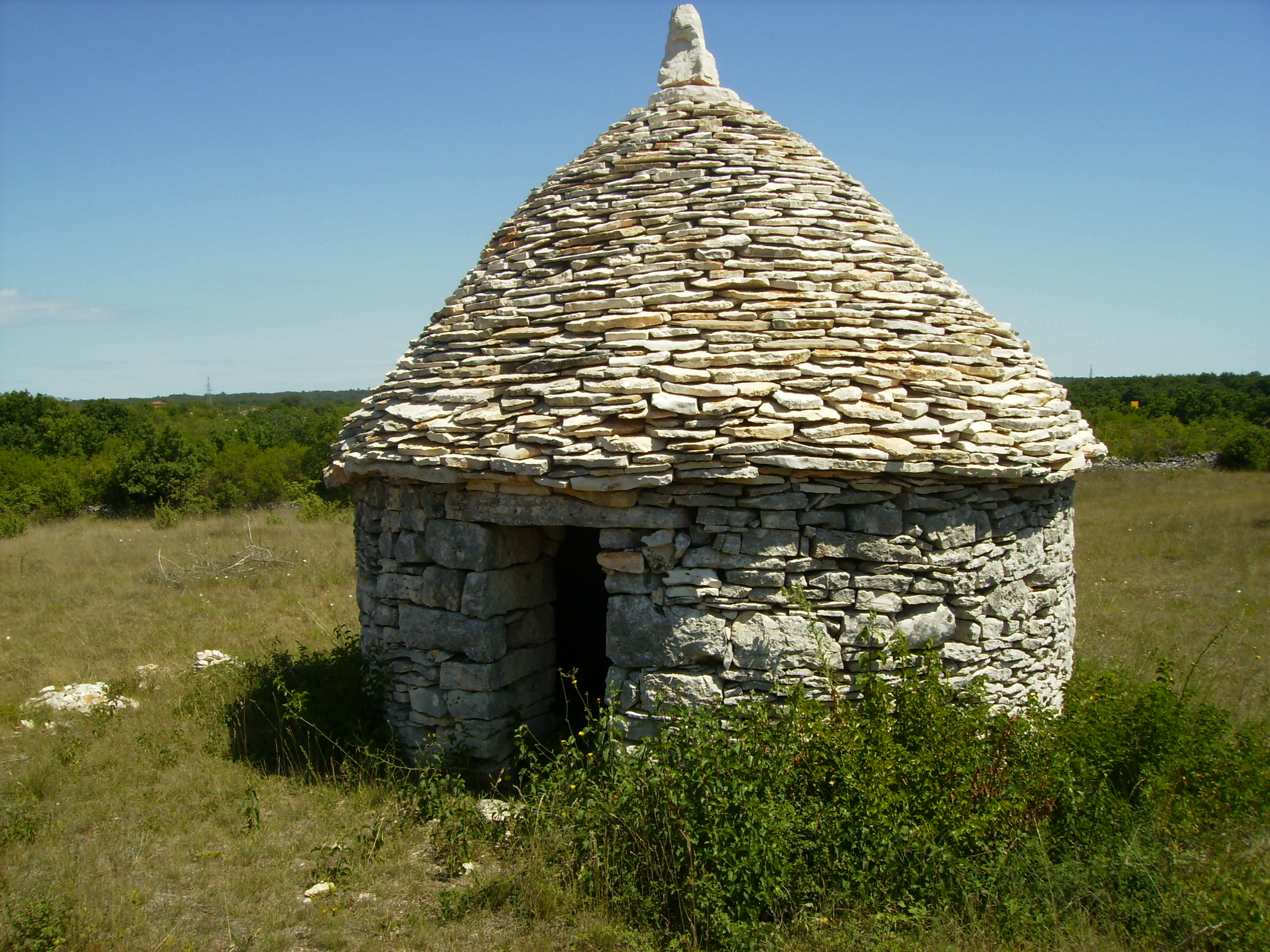 Kažun blizu Vodnjana